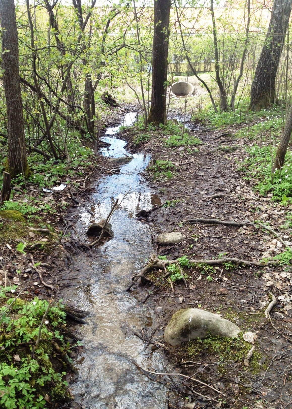 Ekebergbekken, rett øst for Ekeberg skole